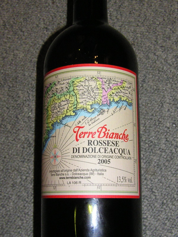 Bottle Rossese di Dolceacqua, a DOC-Wine